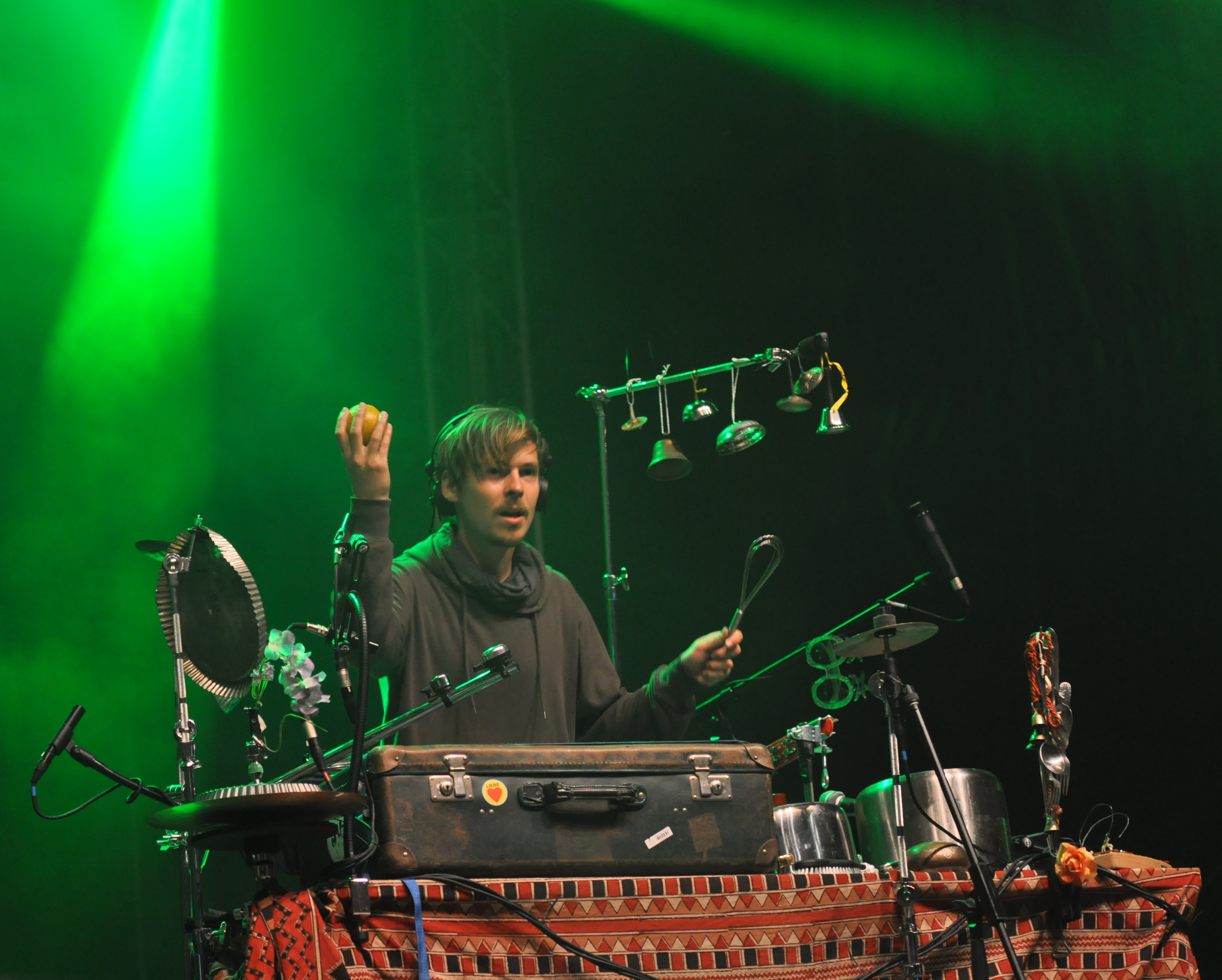 Käptn Peng & Die Tentakel von Delphi beim Rocken am Brocken 2014.